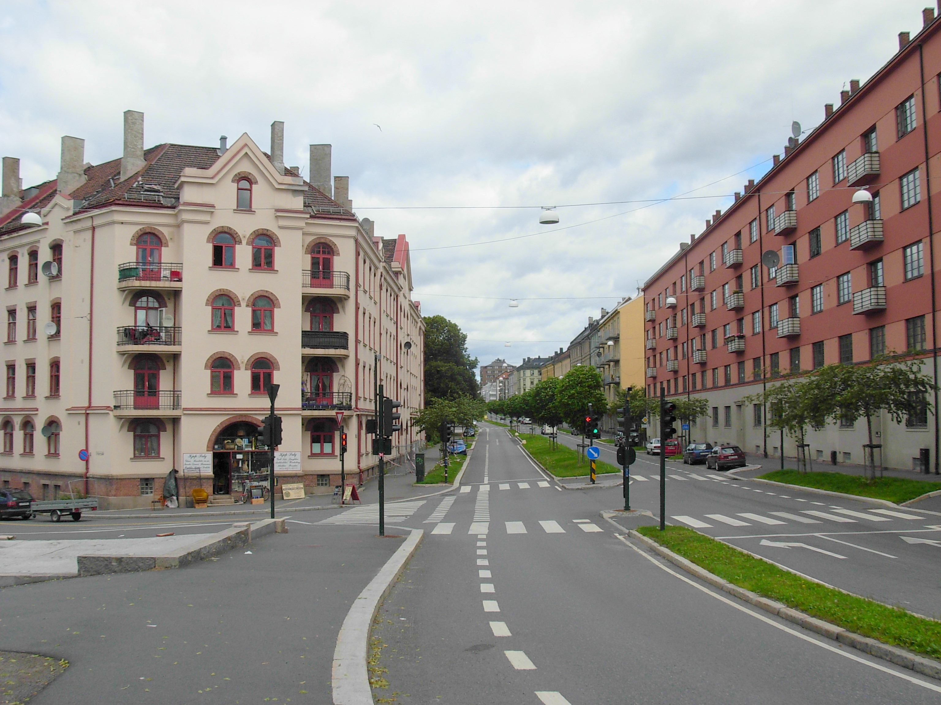 Kjølberggata, Tøyen, Oslo, sett fra Åkebergveien